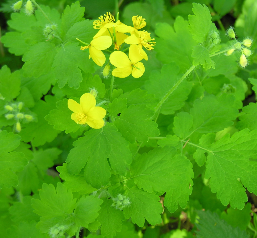 Didžioji ugniažolė (Chelidonium majus) Šeima. Aguoniniai (Papaveraceae) Fotografavo: Algirdas, 2006 m. gegužės 13 d., Lietuva